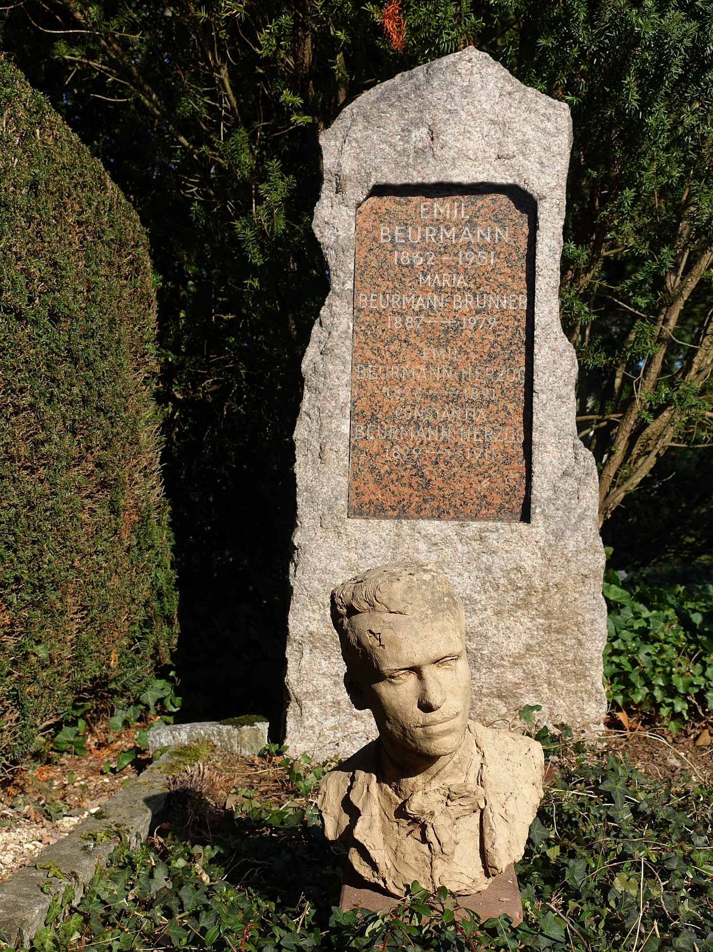 Emil Beurmann (1862–1951), Künstler, Maler, Schriftsteller, Dichter. Grab auf dem Friedhof Wolfgottesacker in Basel